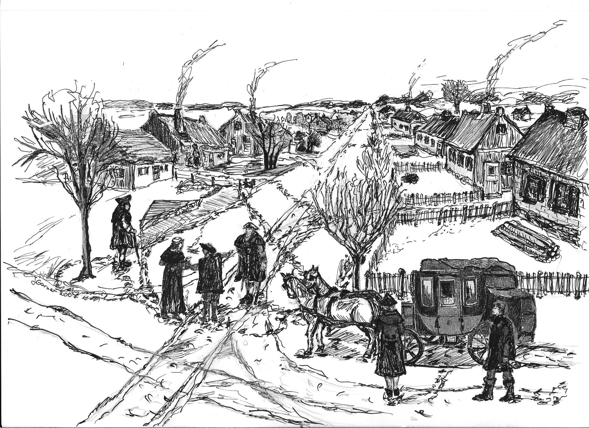 Inspektion der Königlichen Kriegs- und Domänenkammer Glogau in der neuerbauten Kolonie Sprottischwaldau im Februar 1777, auf Grund eines Bittbriefes an den König von Preußen, der von den Kolonisten am 14.Januar 1777 geschrieben wurde.